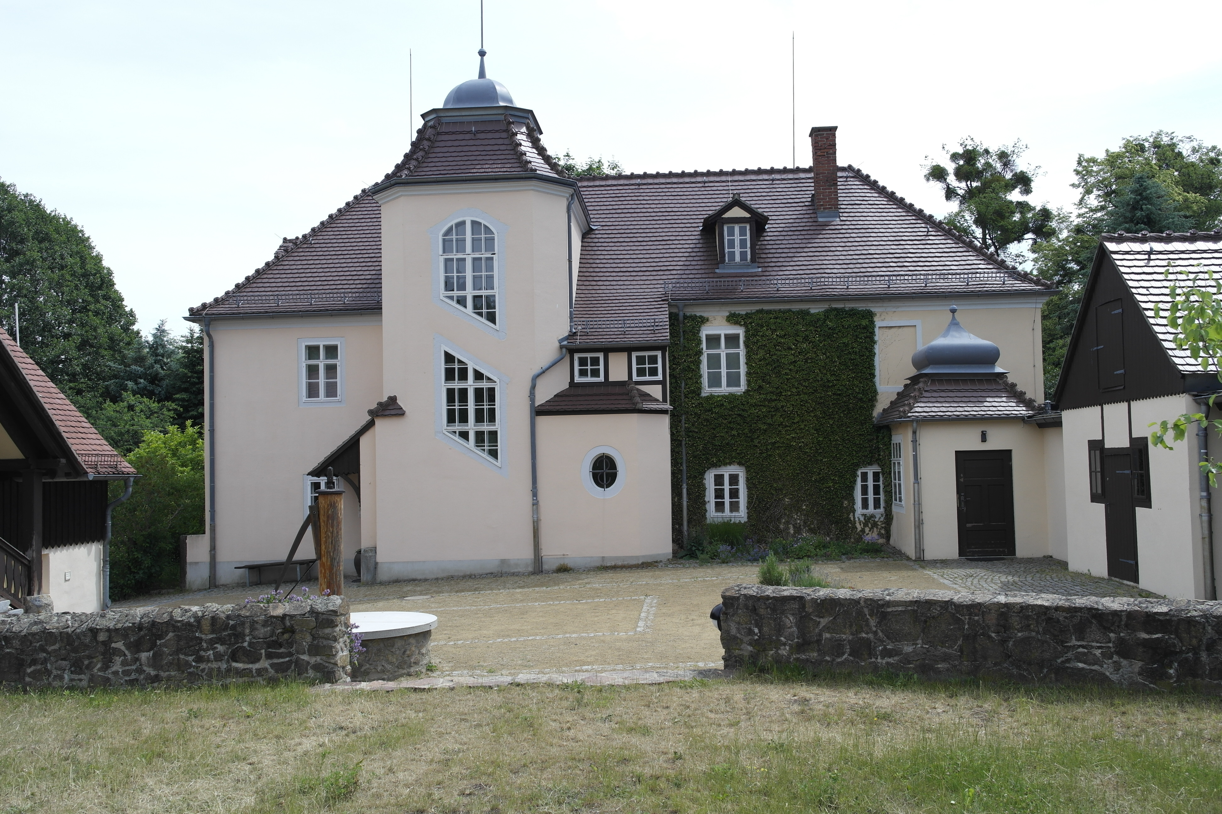 Moritzburg, Meißner Straße 7, Rüdenhof